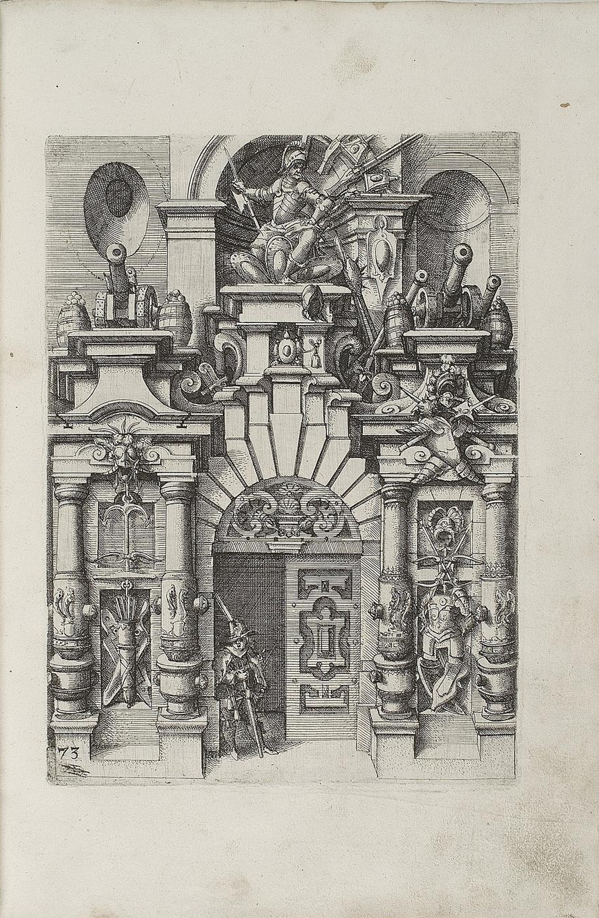 Portal mit allerhand Waffenobjekten: Kanonen, Pulverfässer, Trophäen und Säulen in der Form von Kanonenrohren.